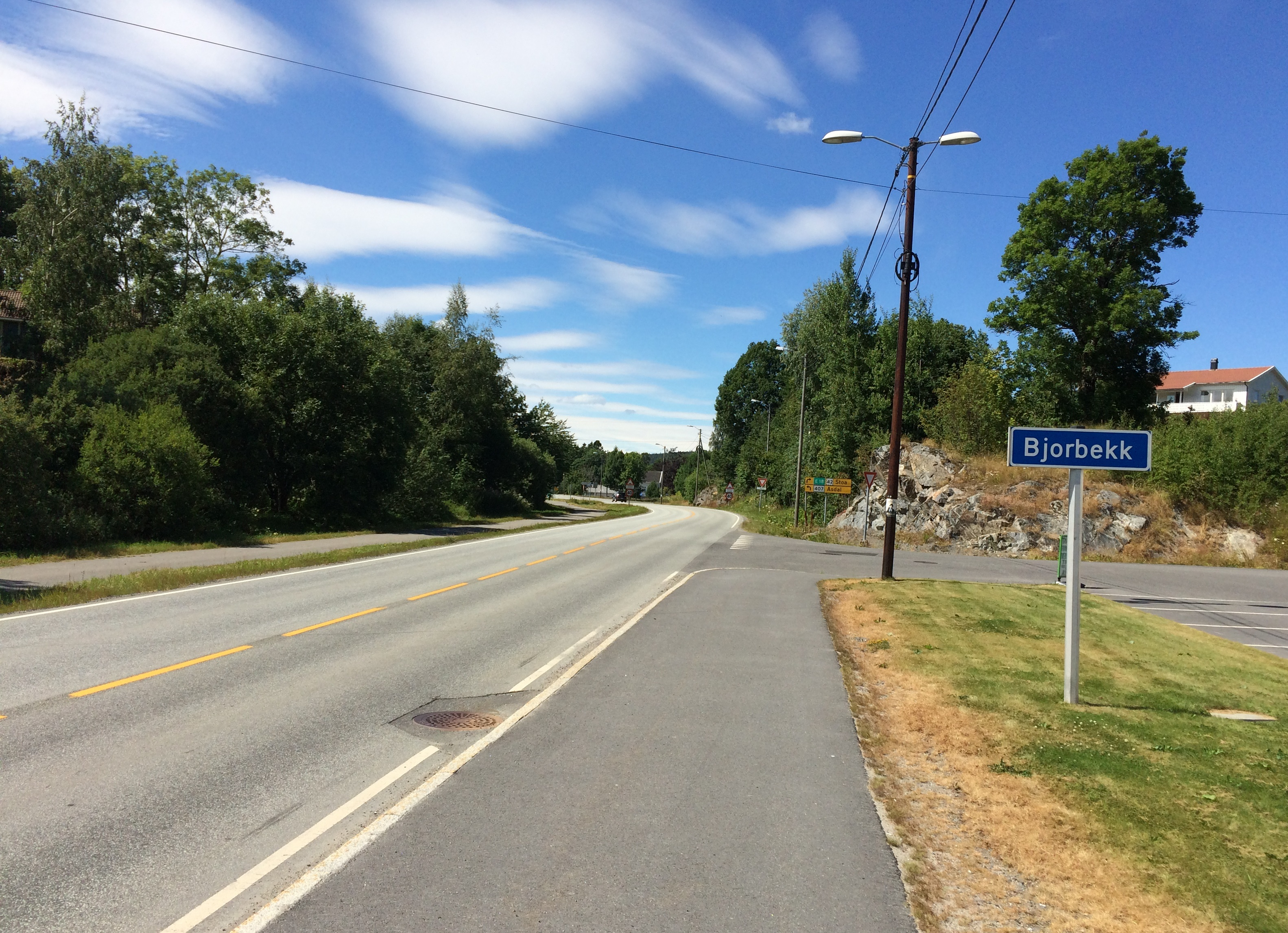 Primær fylkesvei 407 ved Bjorbekk i Arendal kommune